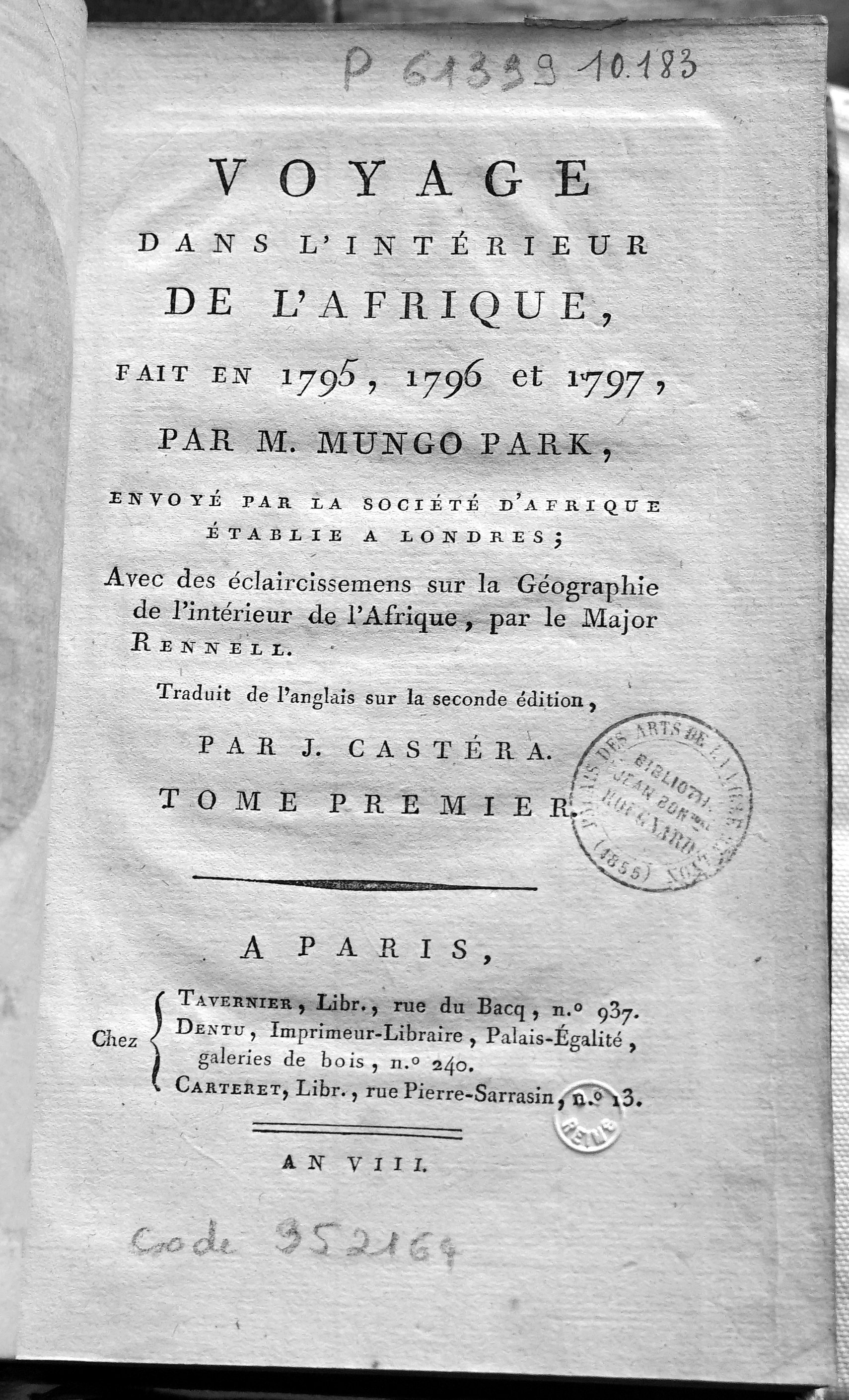 traduction française de la seconde édition du livre de Park.